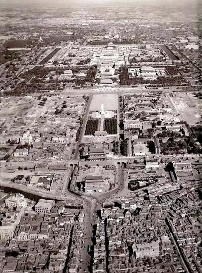 北京市中心航拍图。注意图中的中华门仍在，人民英雄纪念碑已经建成，广场两侧人民大会堂和中国历史博物馆（今中国国家博物馆）尚未动工。人民英雄纪念碑于1958年年中揭幕；中华门拆除于1959年；人民大会堂和博物馆是1959年献礼建筑，当年兴工并竣工。证明此图拍摄时间约在1958年至1959年间。